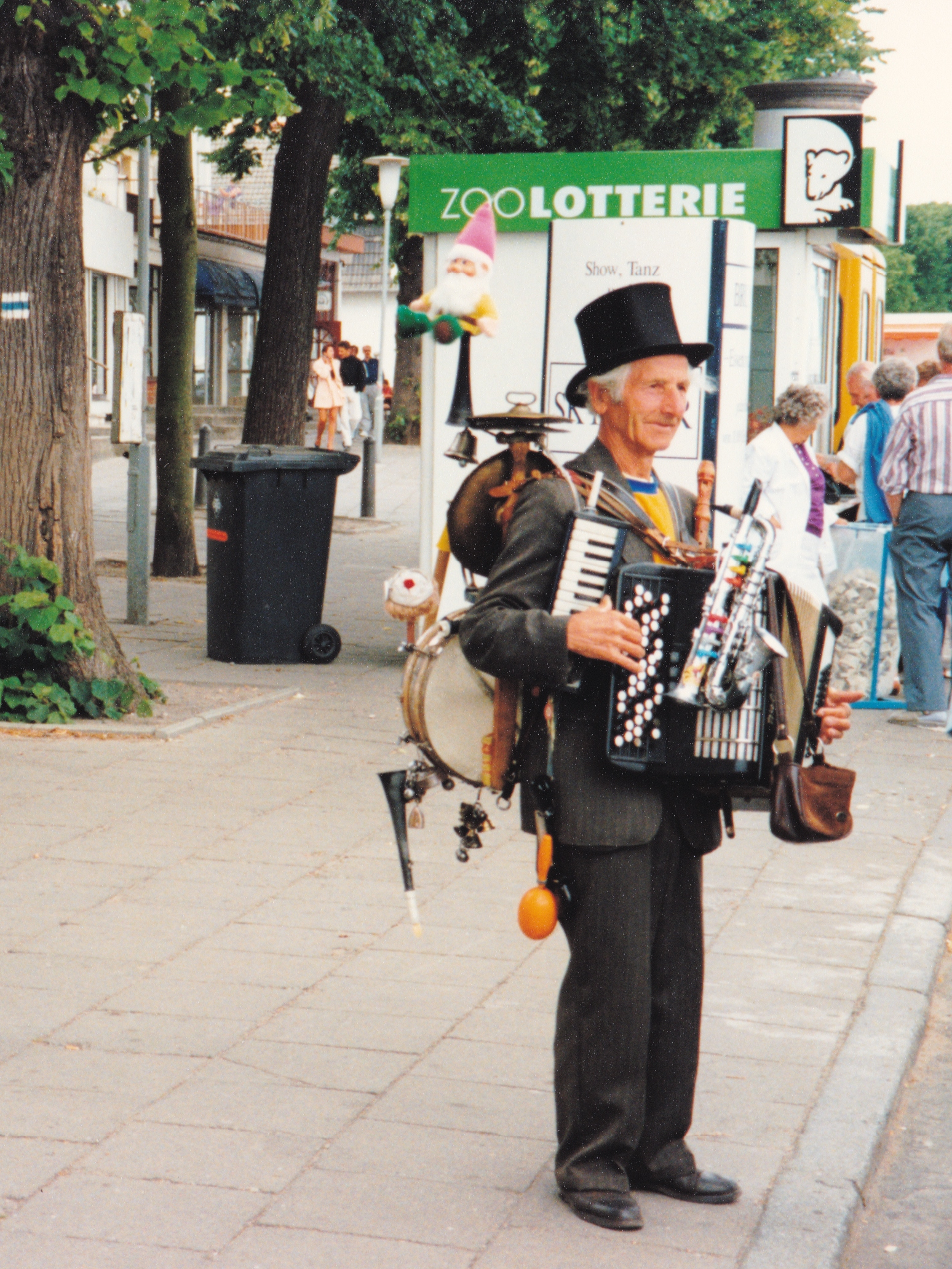 Stadtoriginal und Straßenmusiker Michael Tryanowski 1992 in Warnemünde am Alten Strom